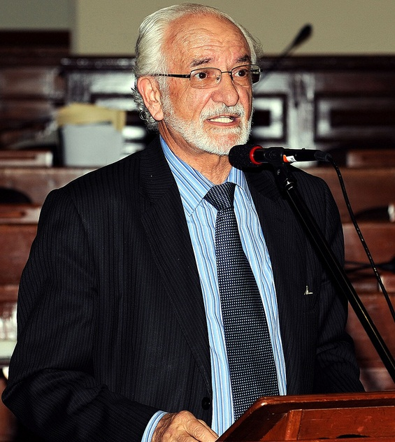 El ministro de Ambiente, Antonio José Brack Egg, interviene en la sesión del Pleno del Congreso efectuada esta tarde, en la que se abordó temas presupuestales.